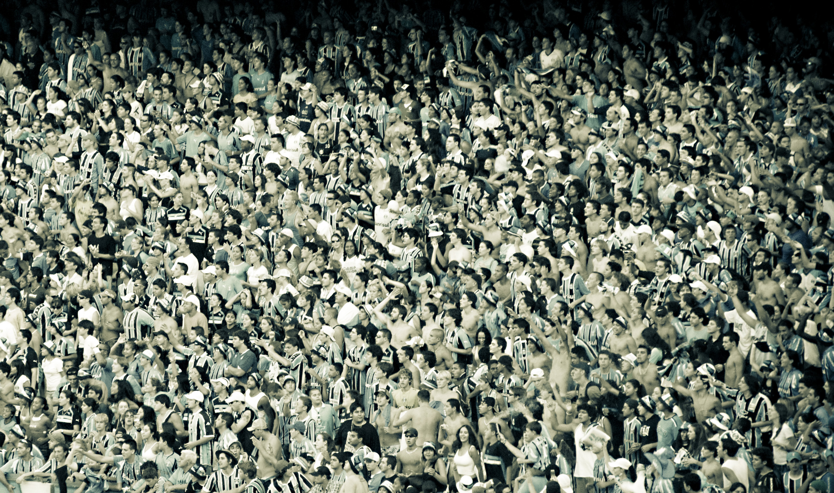 ¿Ves al jugador de allá? Es muy importante para nuestro equipo en todo lo referente a la estrategia y a la disposición de los jugadores en la cancha. -- ¿El que acaba de salir? -- Supongo que ya se cansó.